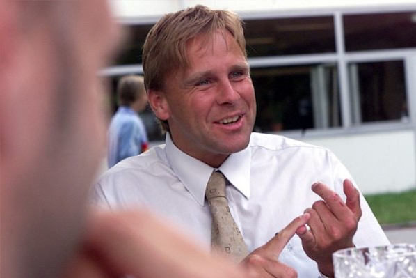 Jonas Wirmola juli, 2018.